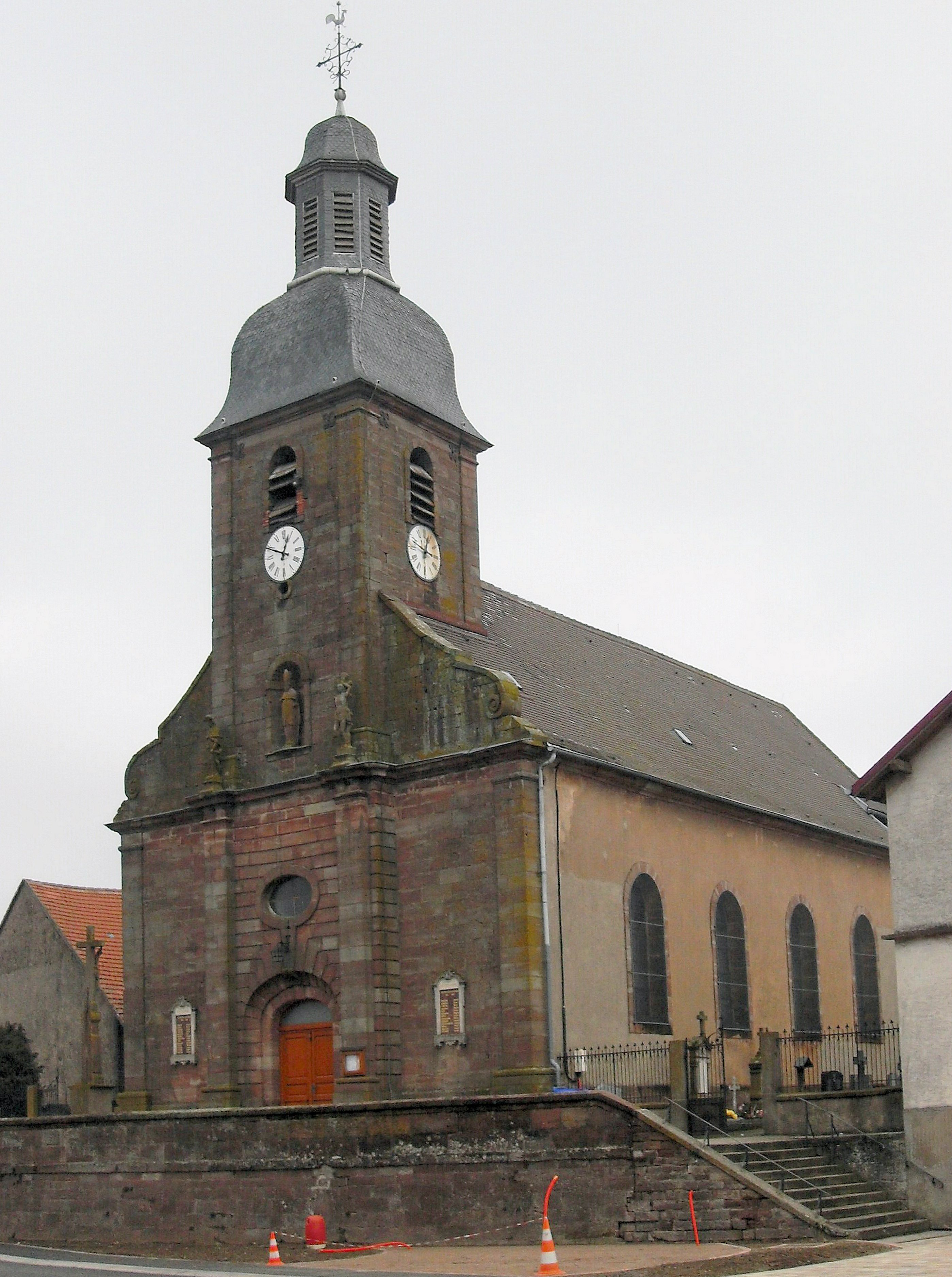 L'église Saint-Martin à Mittelbronn